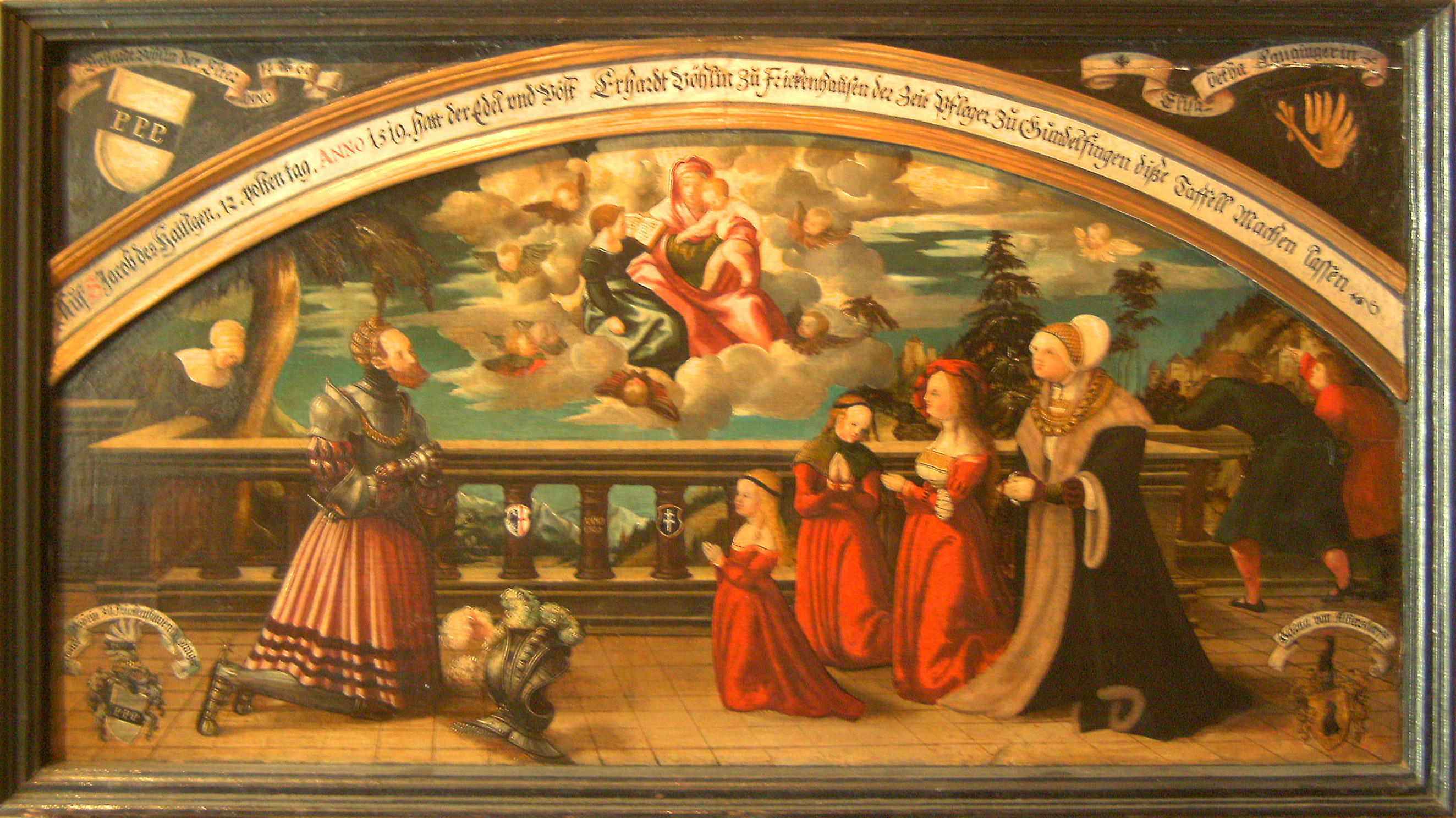 Antoniter-Strigel-Museum Memmingen - Stifterbild Vöhlin.